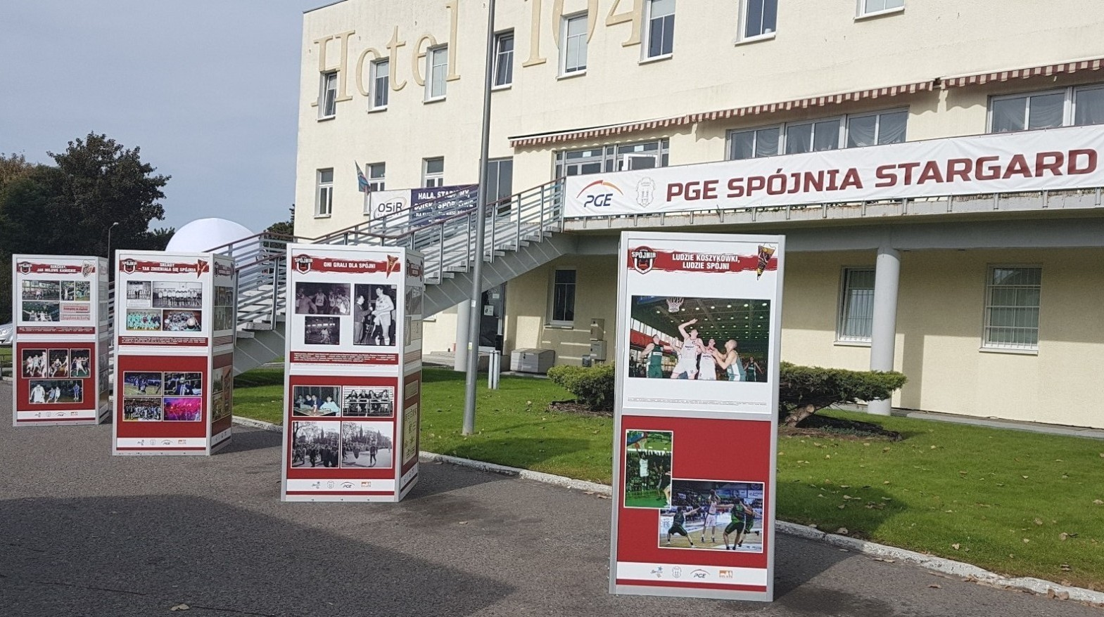 70-lecie PGE Spójnia Stargard